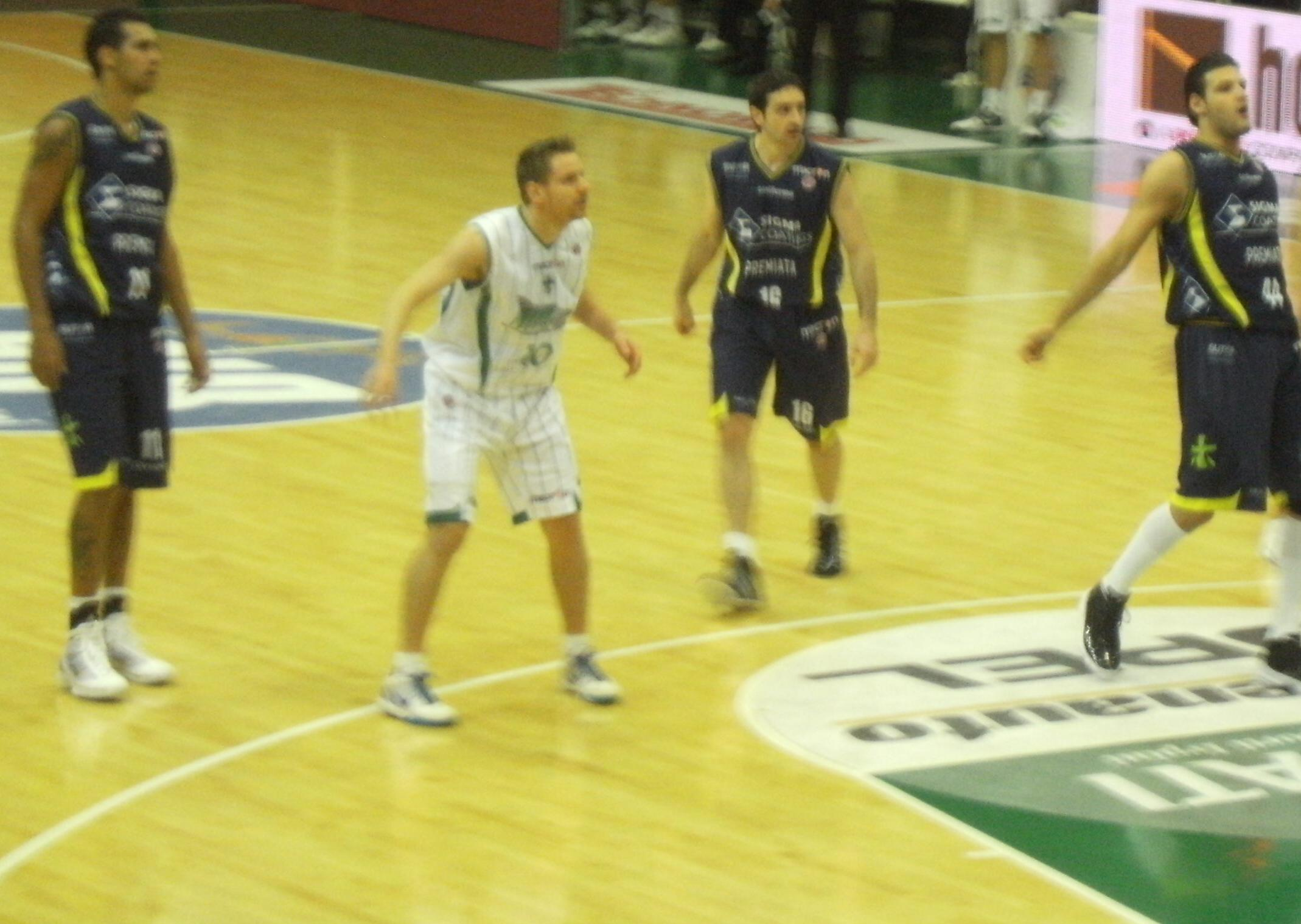 Sutor Basket Montegranaro - Felice Scandone 1948 Avellino Avellino PalaDelMauro